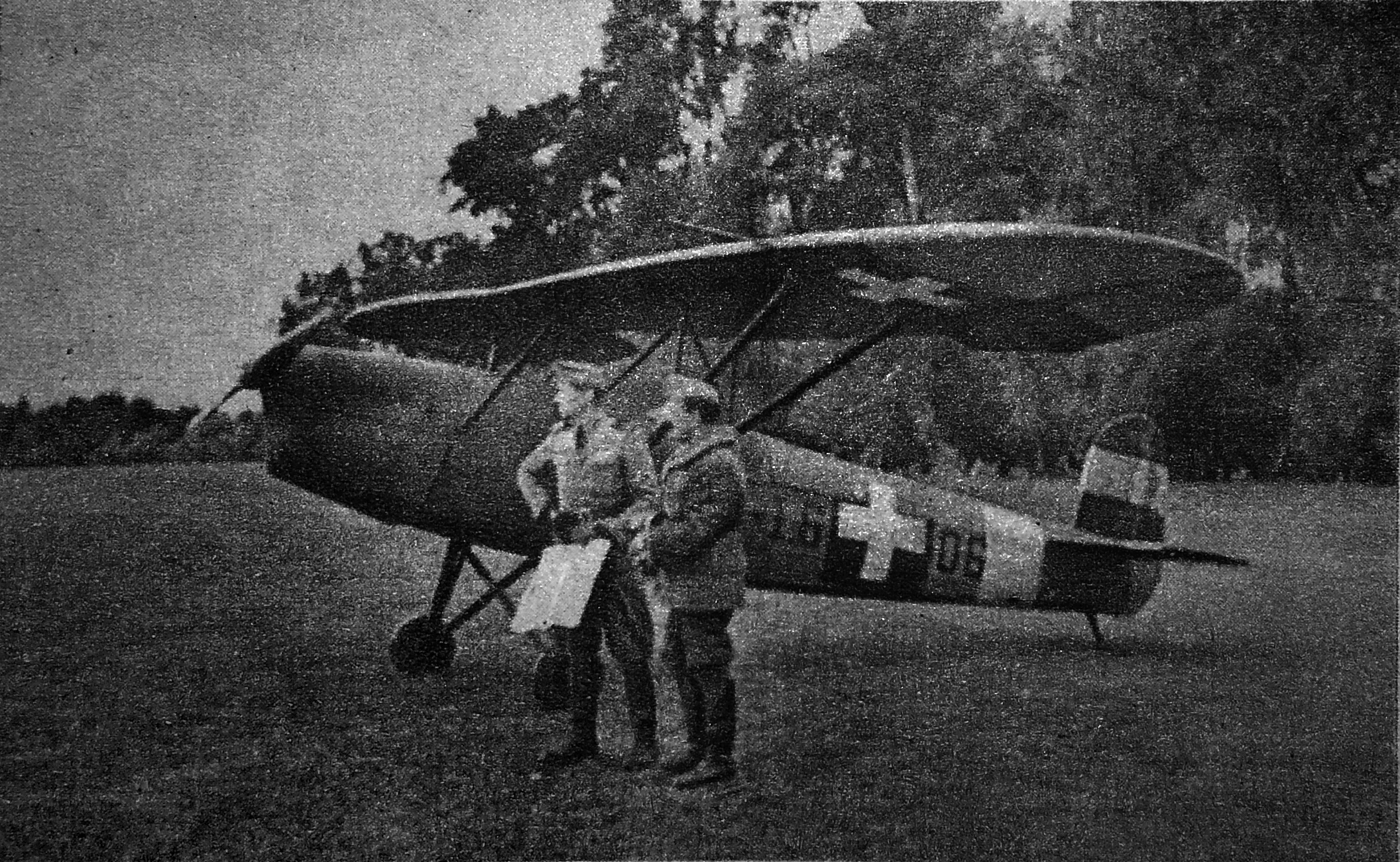 A légierő pilótái 1944-ben egy Levente II.-vel új leszállóhelyeket keresnek a Dunántúlon